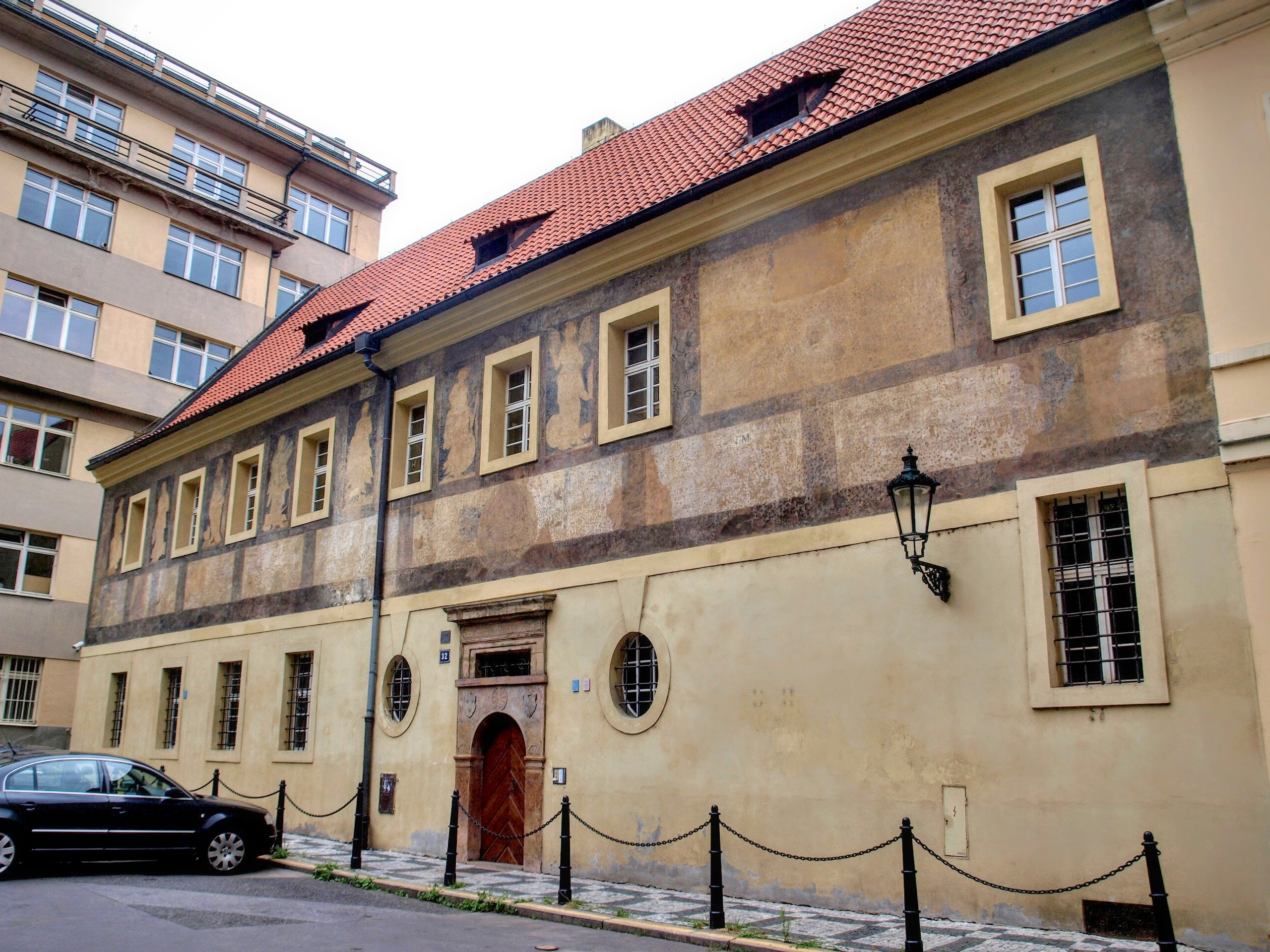 Svatojindřišská farní škola